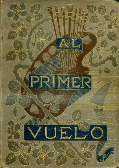 Portada de Al primer vuelo (idilio vulgar) (dos volúmenes).